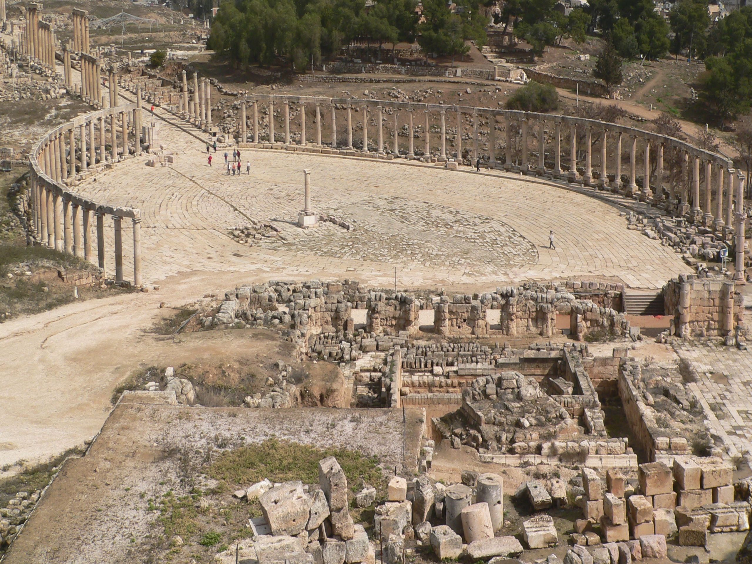 M. Disdero 19/02/2007